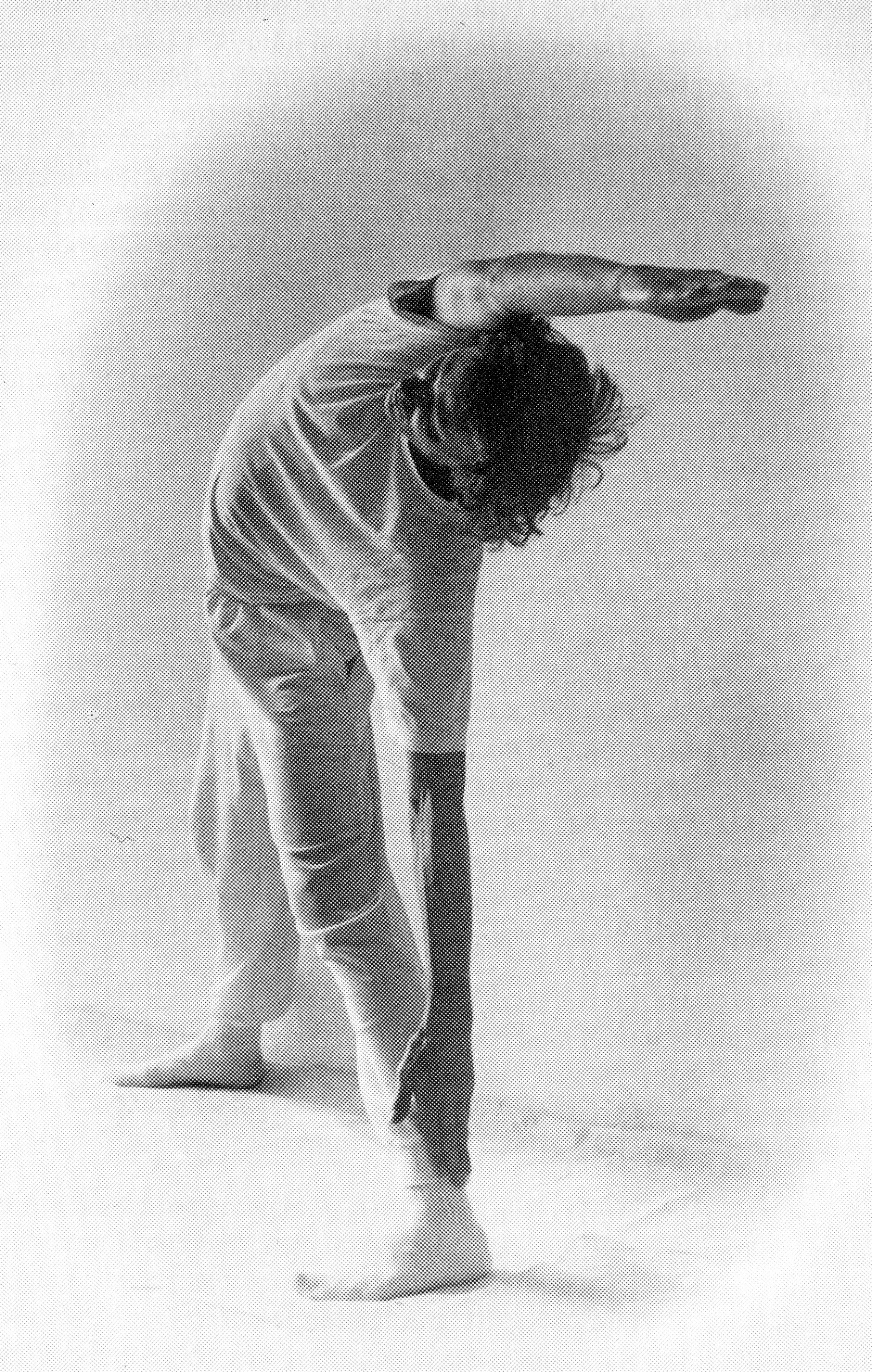 Yogaübung Trikonasana, ausgeführt von Heinz Grill im Jahr 1992